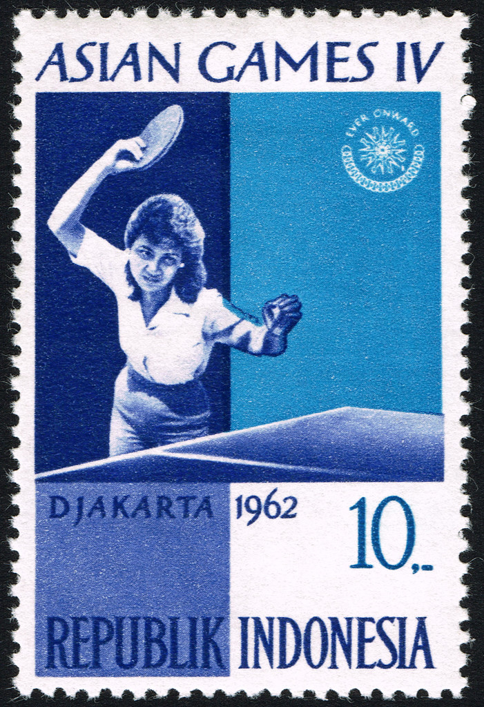 Asian Games IV